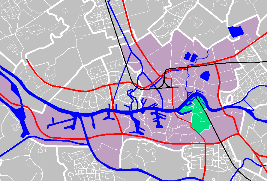 Rotterdam districts/neighboorhoods